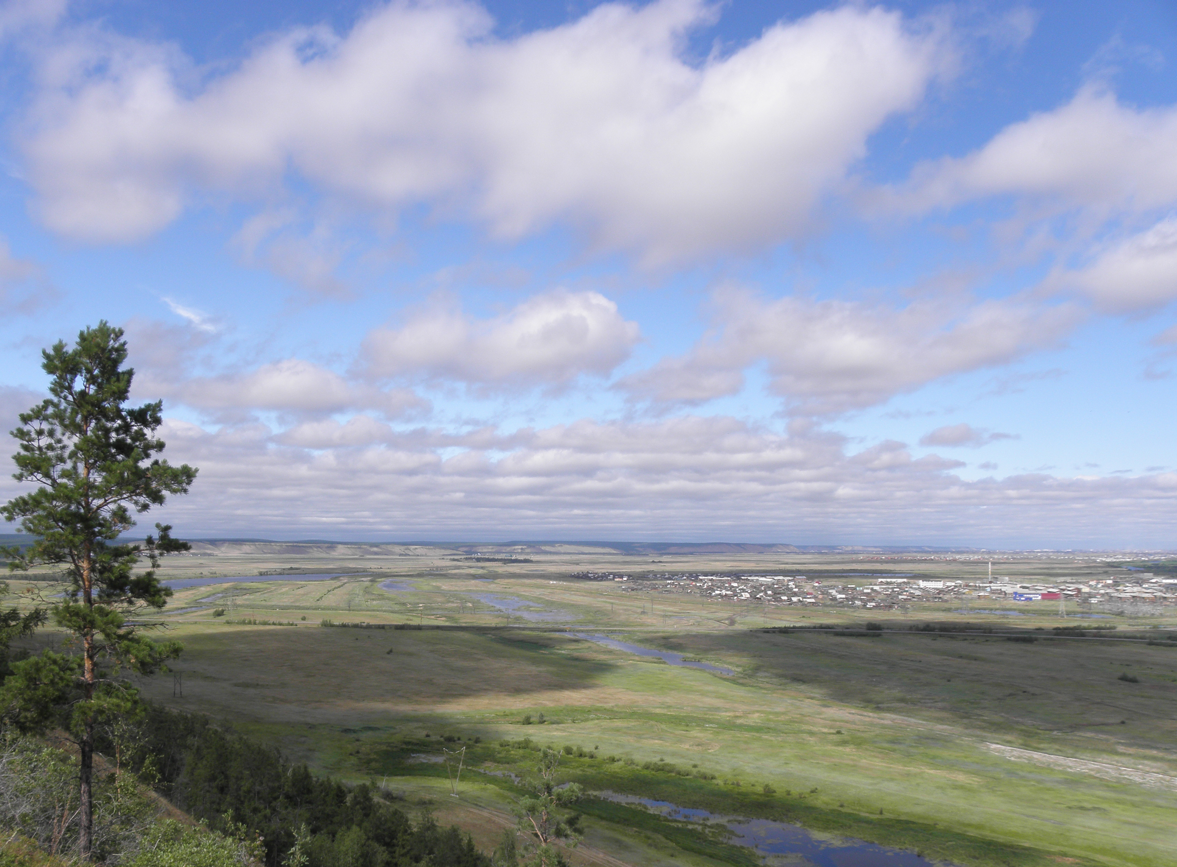 Вид на село Новая Табага с сопок